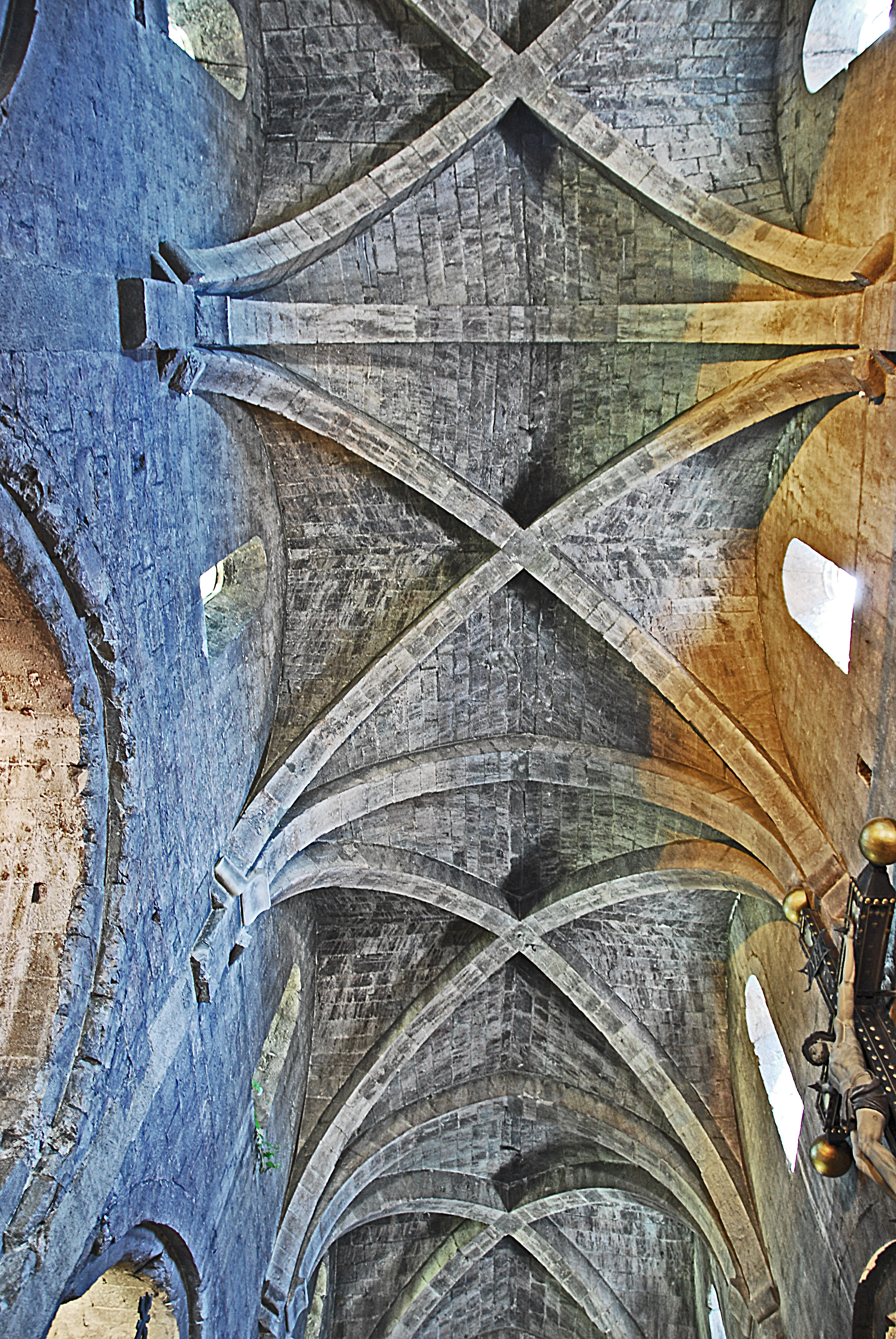 Kathédrale Notre-Dame-du-Puy von Grasse, Kreuzrippengewölbe Mittelschiff